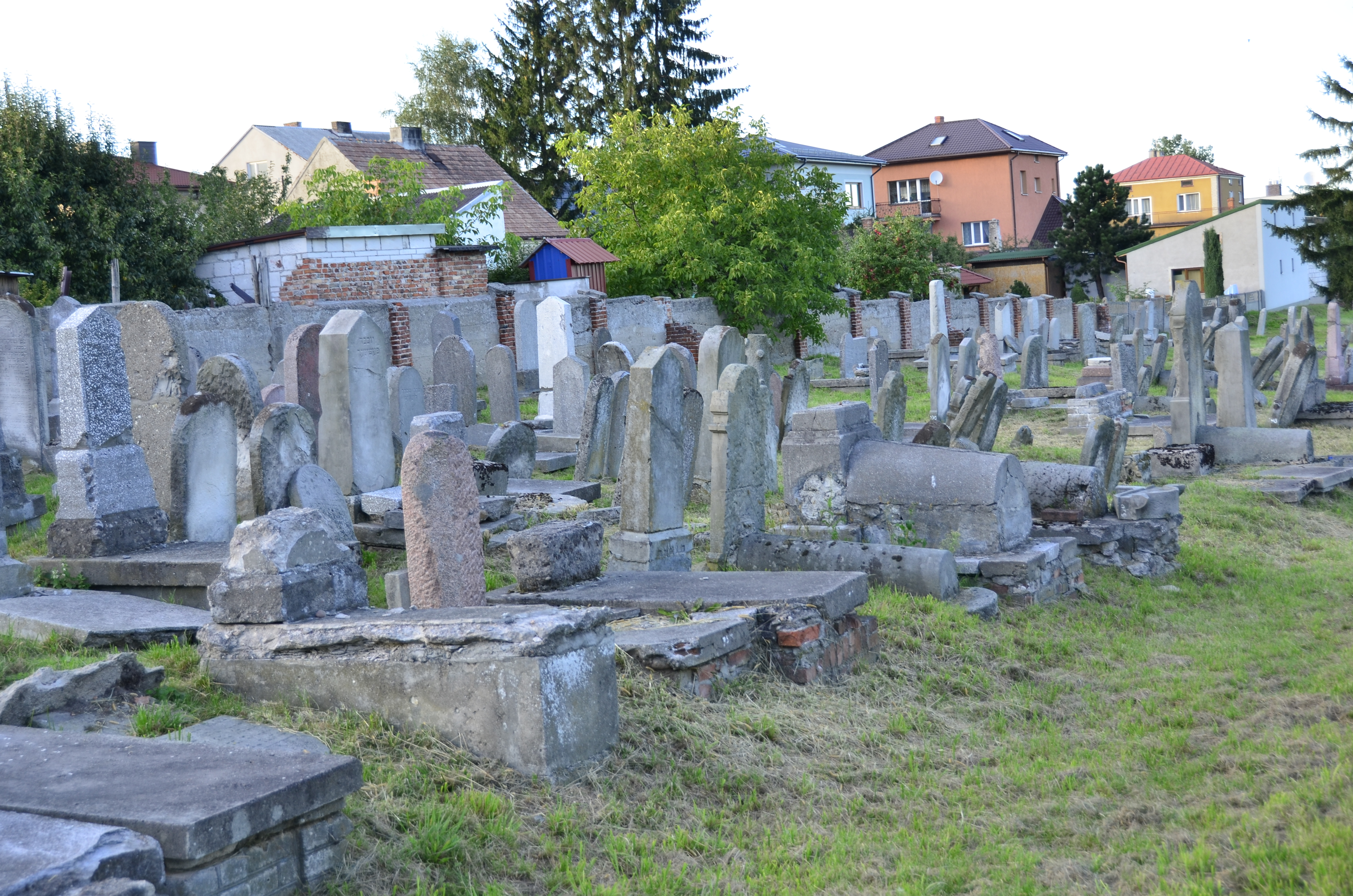 Cmentarz żydowski „nowy” z aleją dojazdową Łomża ul. Wąska 69, Łomża